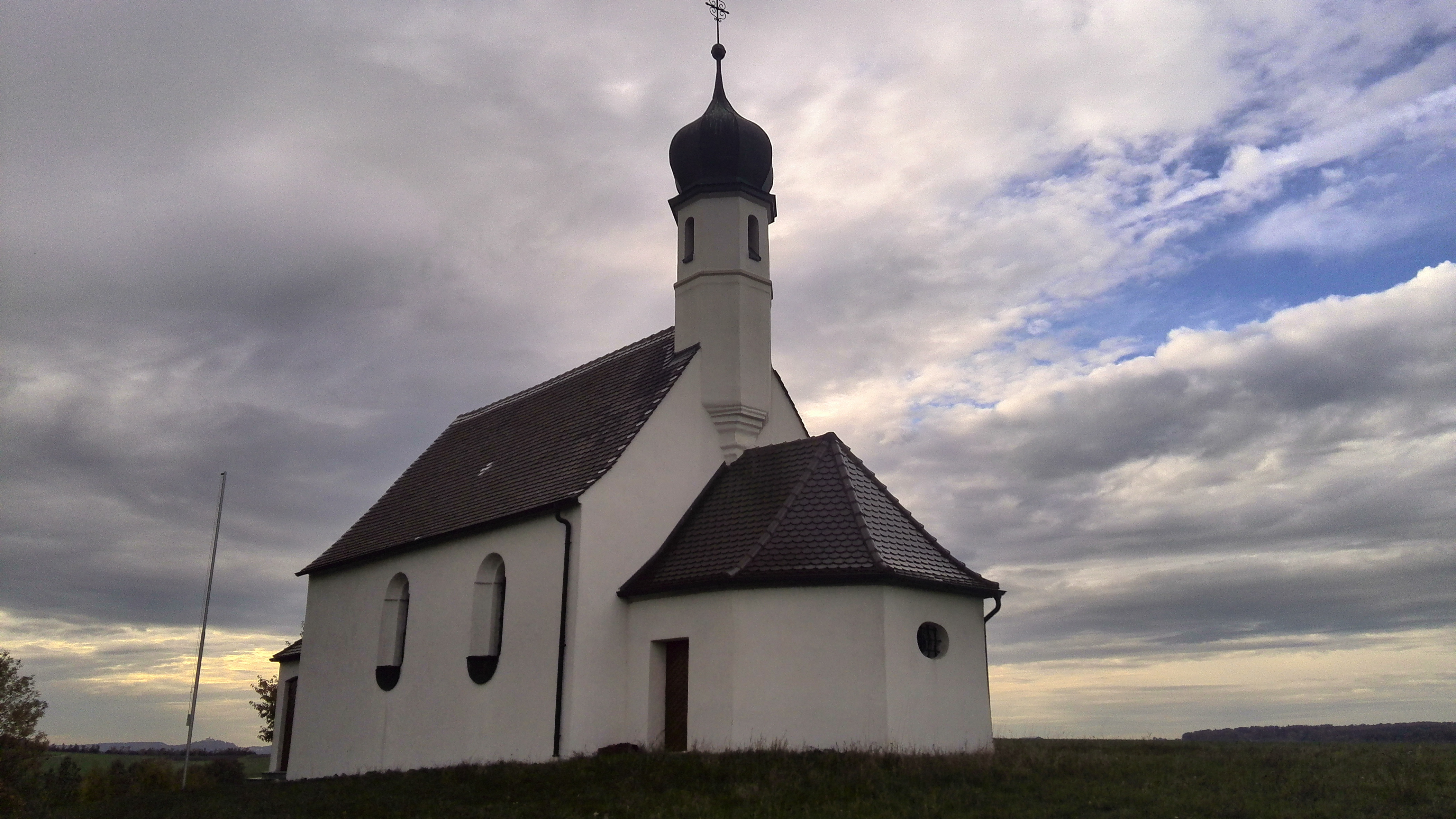 Maria-Hilf-Kapelle Unterwilflingen